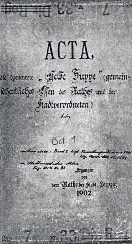 Titelblatt zur Akte „Gelbe Suppe“ von 1902 im Stadtarchiv Leipzig